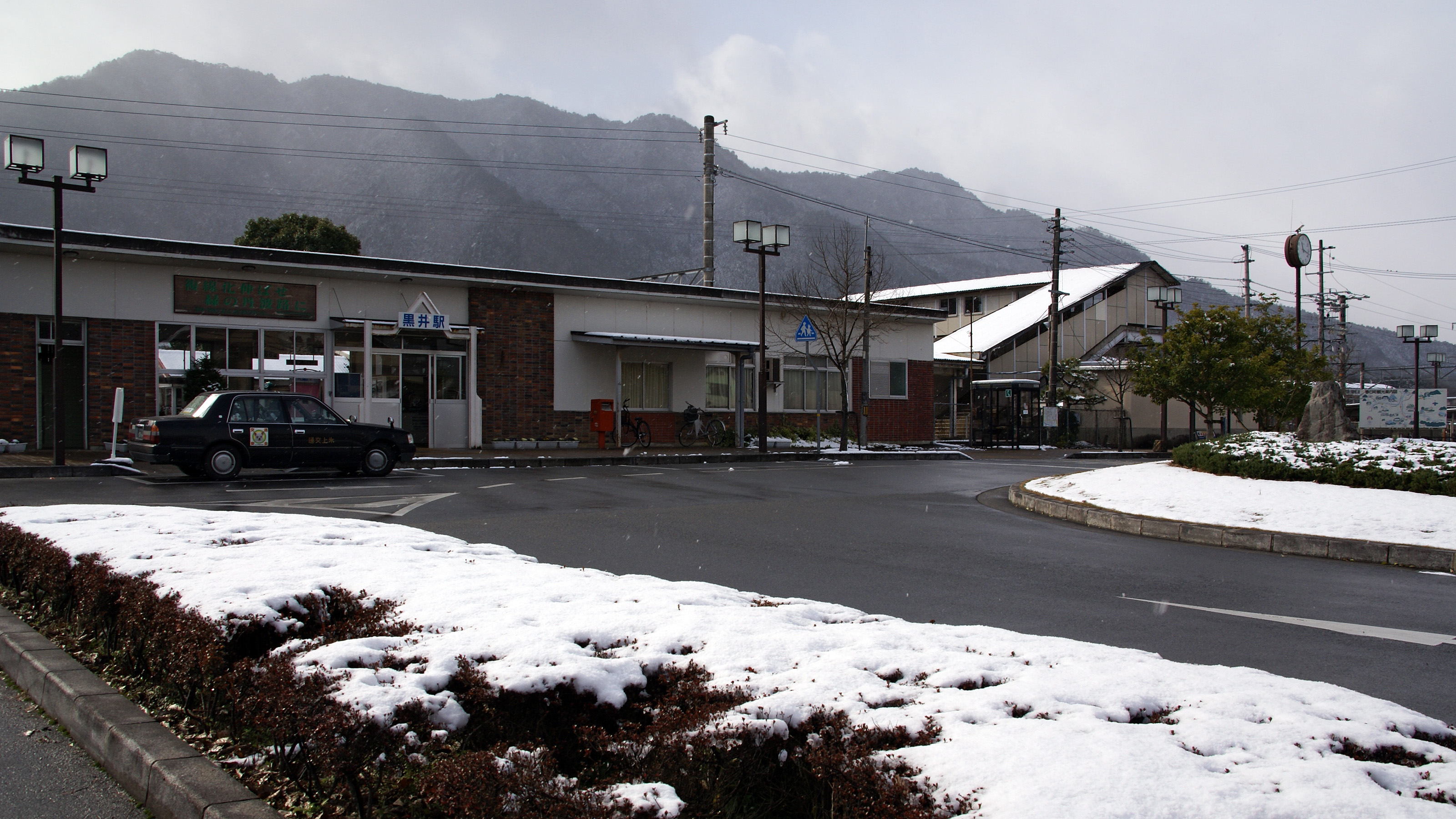 Kuroi Station in Tamba, Hyogo, Japan